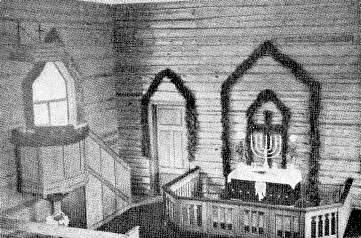 Интерьер кирхи в Калливиере